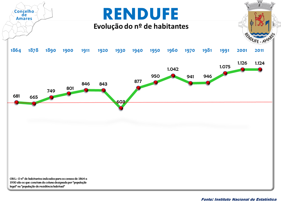 Censo 2011